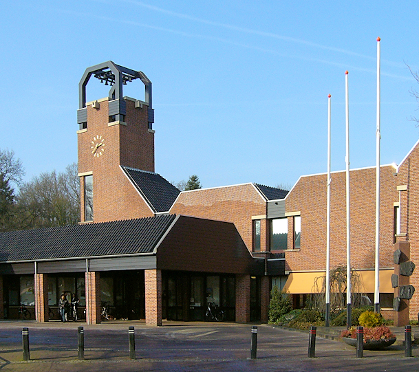 Gemeentehuis te Ermelo Nederland